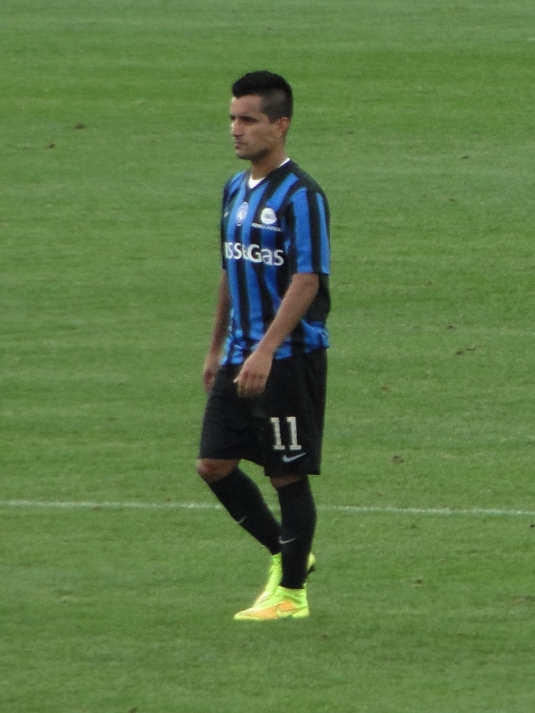 Maxi Moralez, calciatore argentino, con la maglia dell'Atalanta